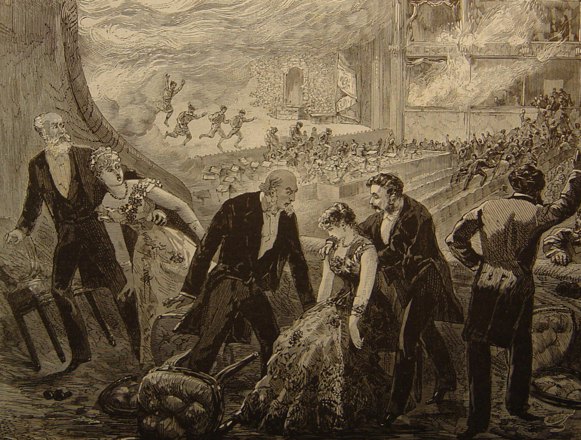 L'incendie du théâtre de Vienne Le 8 décembre 1881 à 7 heures du soir , où allaient être représentés pour la première fois les "Contes d'Hoffman" d'Offenbach, seize cents spectateurs étaient réunies dans le "Ring-théâtre", lorsque le premier cri d'alarme a été jeté , cri tardif Entre six cents et milles spectateurs ont trouvé la mort.